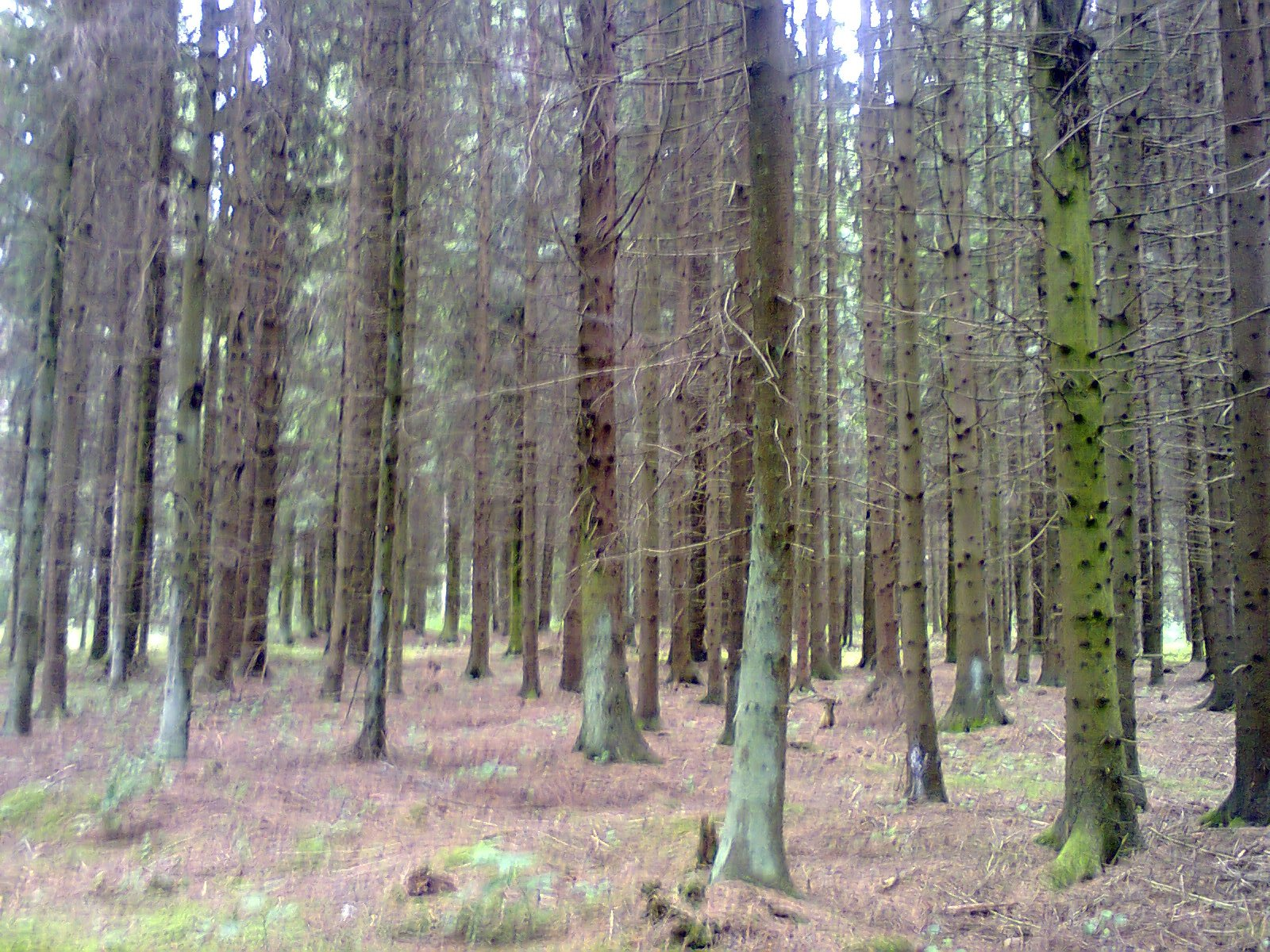 Еловый лес (Латвия)